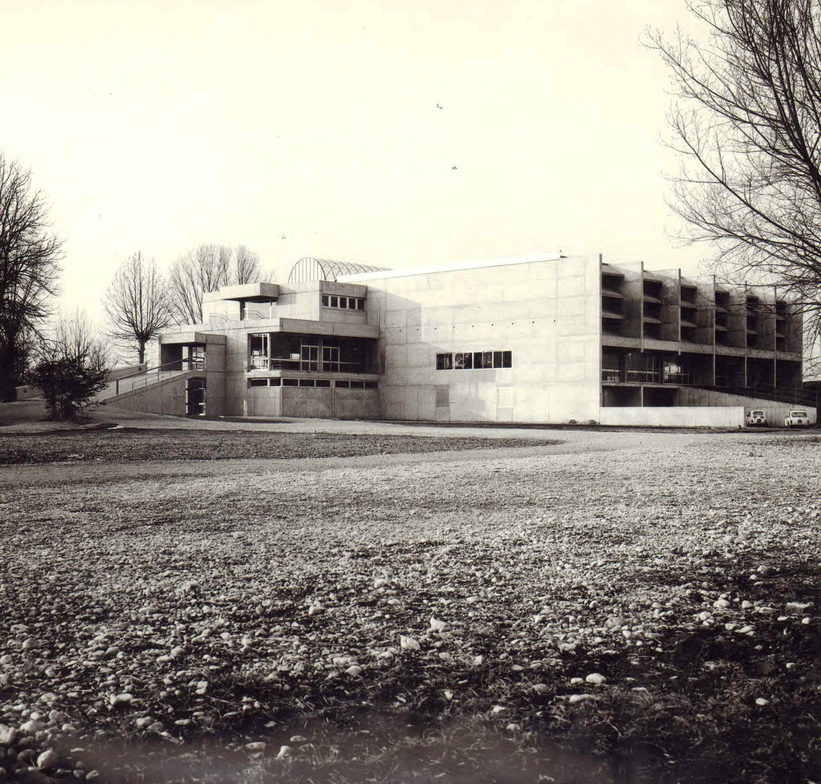 1973 - Centro culturale, Fiume